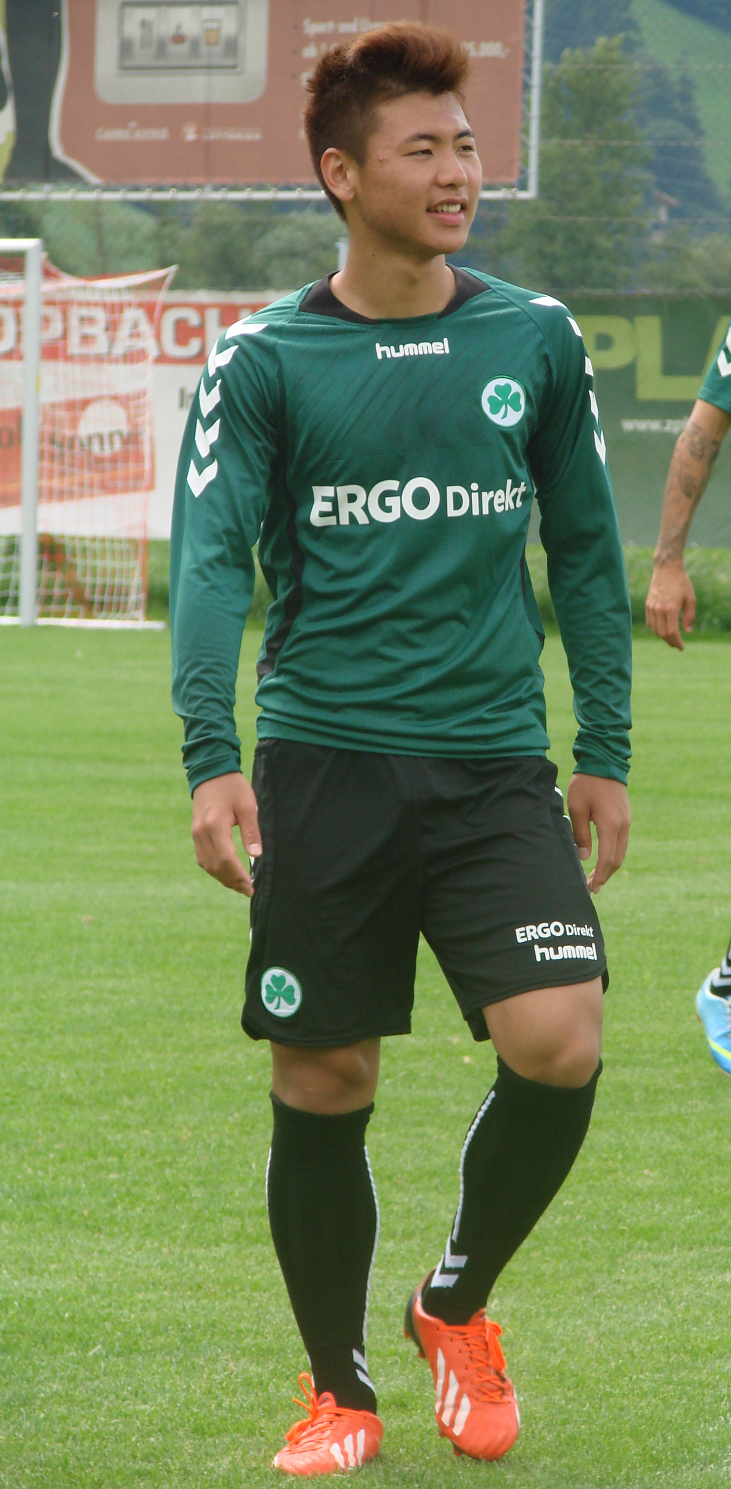 Jung Bin Park